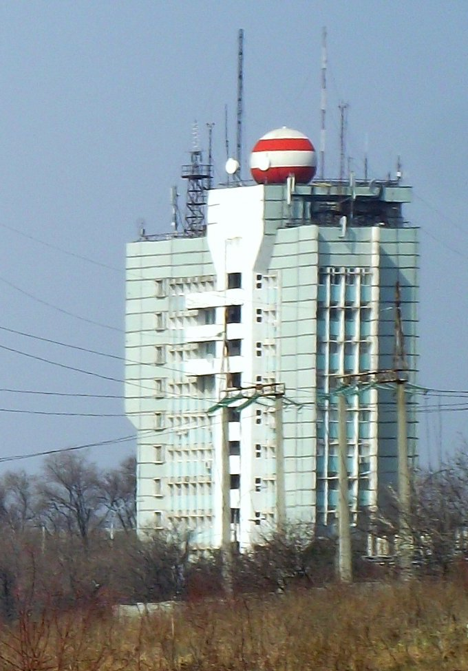 Strada Grenoble 110, Chișinău, Moldova